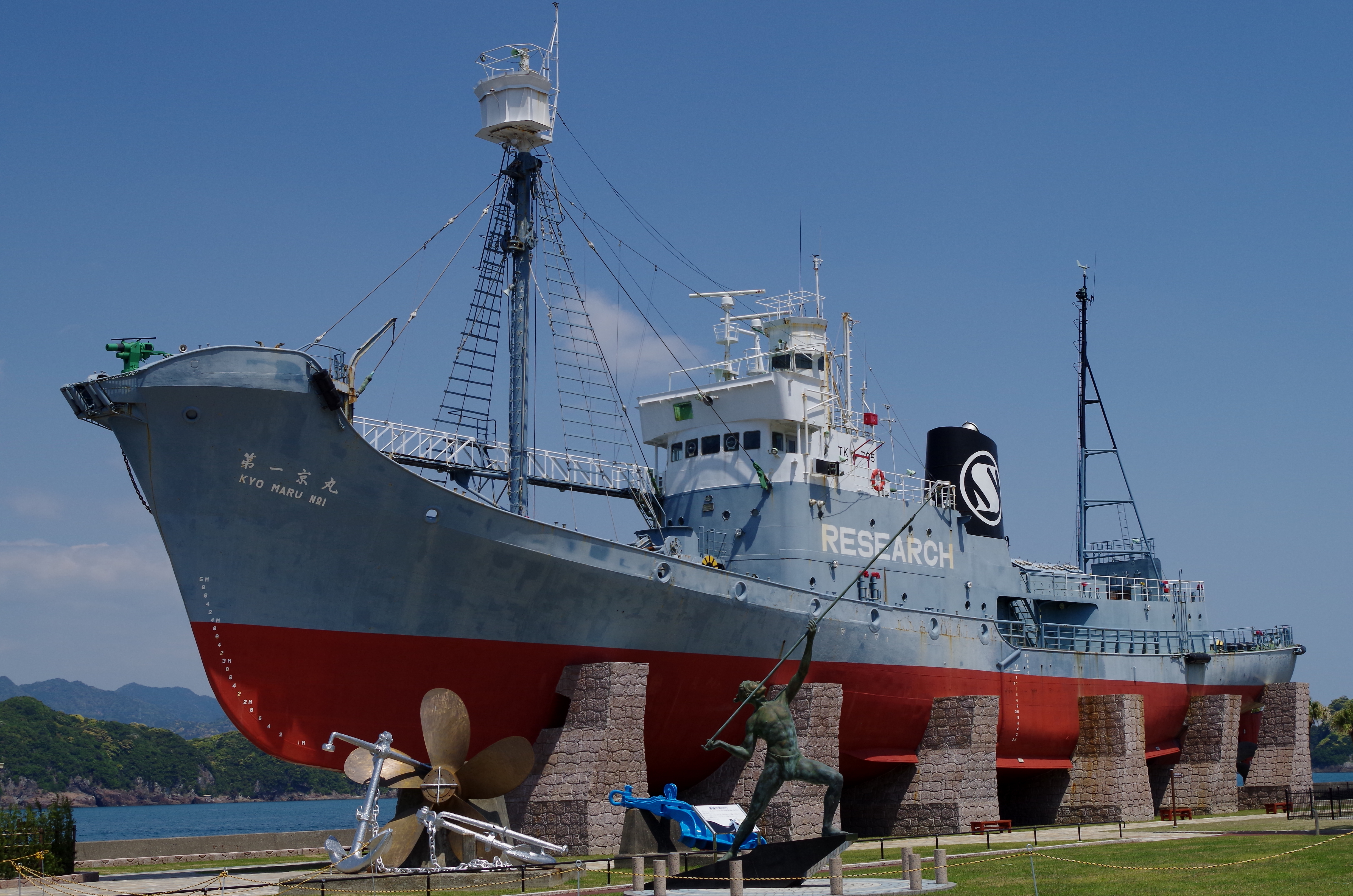 捕鯨船・第一京丸 太地くじら浜公園 和歌山県東牟婁郡太地町